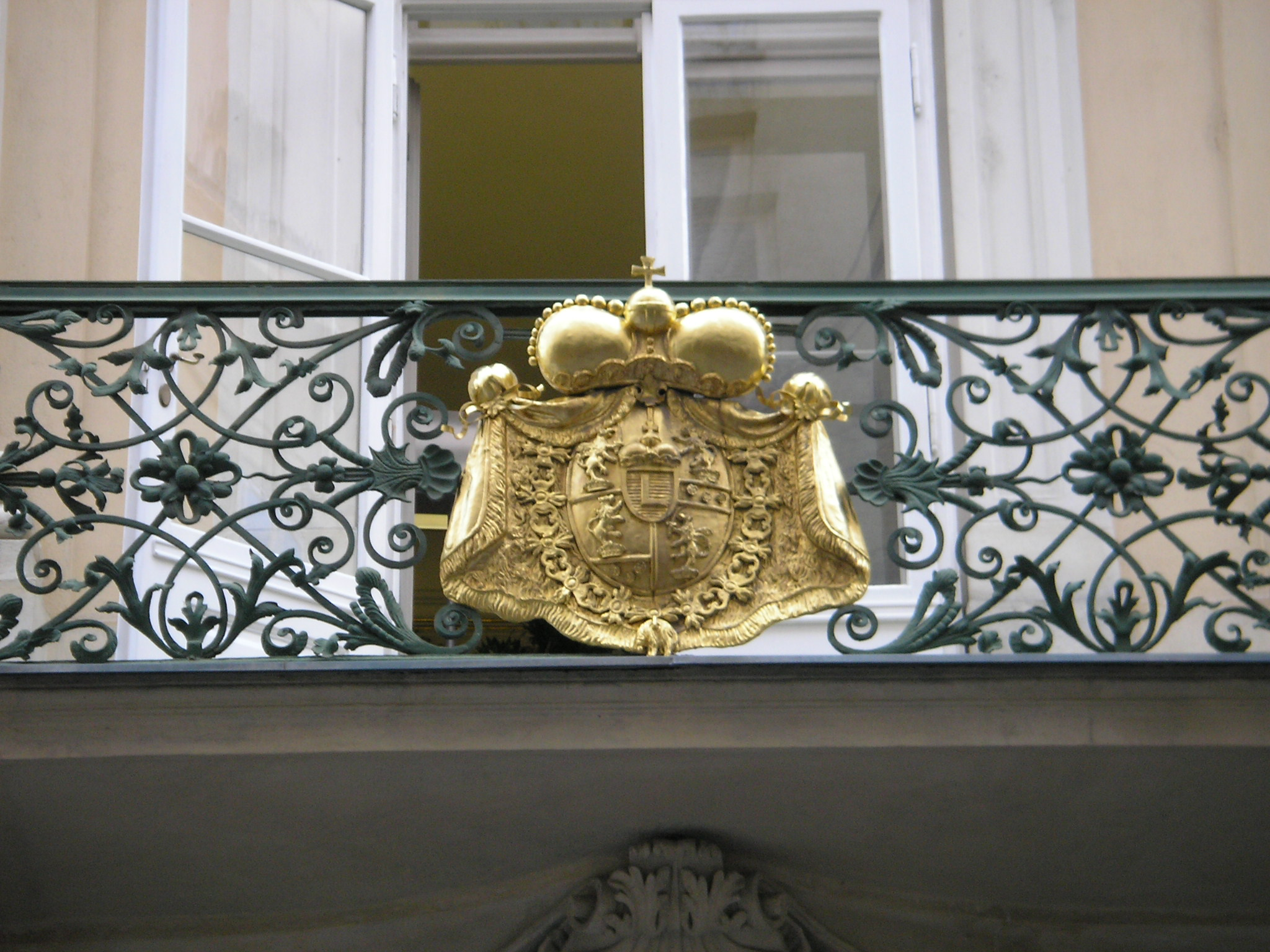 Palais Esterházy in Vienna, at Wallnerstraße.